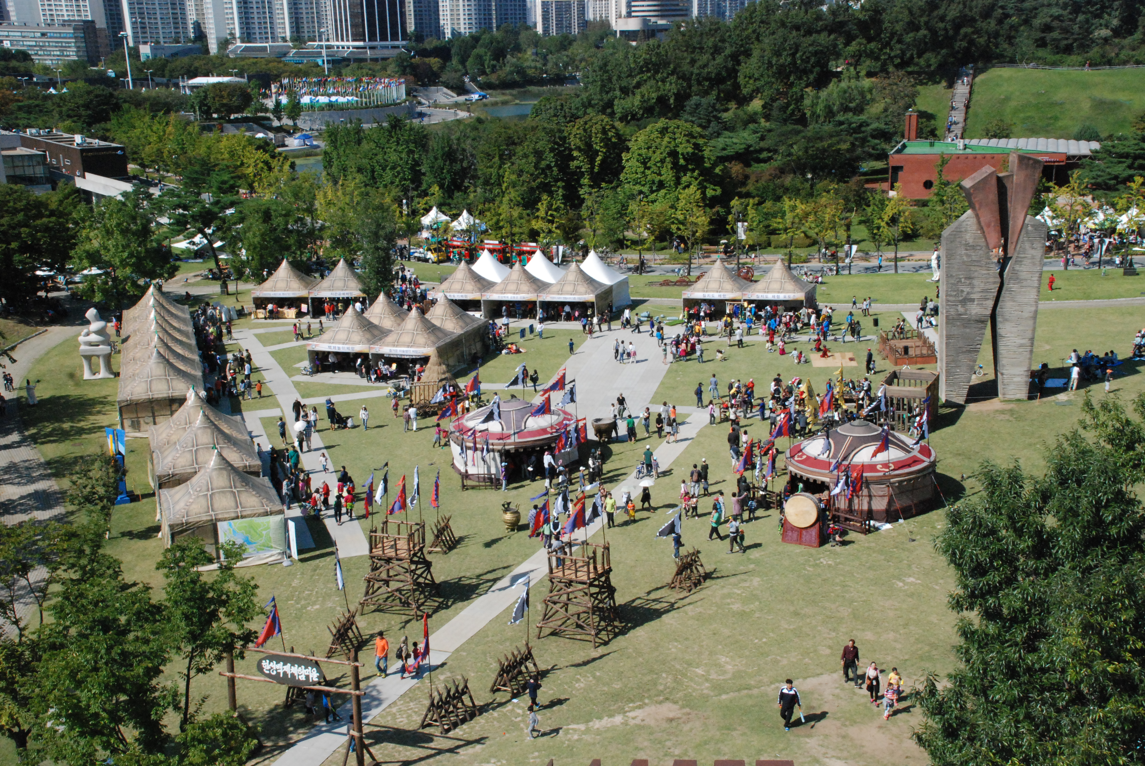 제13회 한성백제문화제 백제체험마을